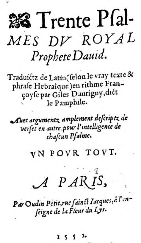 Title page of Gilles Daurigny Trente psalmes (Paris, 1551)